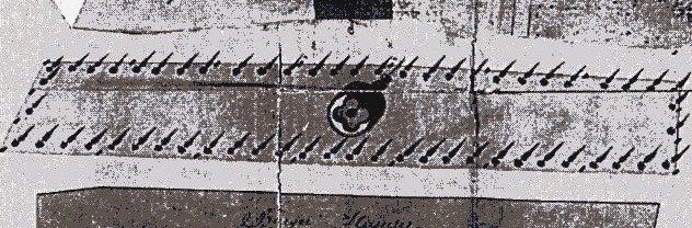 Umgerstaltungsplan für den Maxplatz (Ausschnitt), Nürnberg